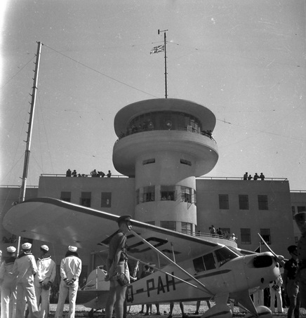 1938 מטוס Taylorcraft-VQ-PAH היו שלושה מטוסים מסוג שימשו מטוסי אימון דו מושבי בית הספר של פרדי בלוד - / ה.סימון